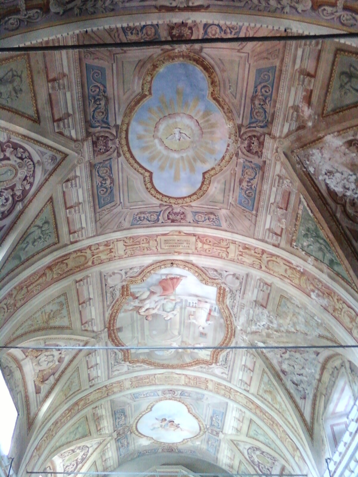 Chiesa di Stella San Bernardo, dipinti sulla volta centrale 1919 (Italy)